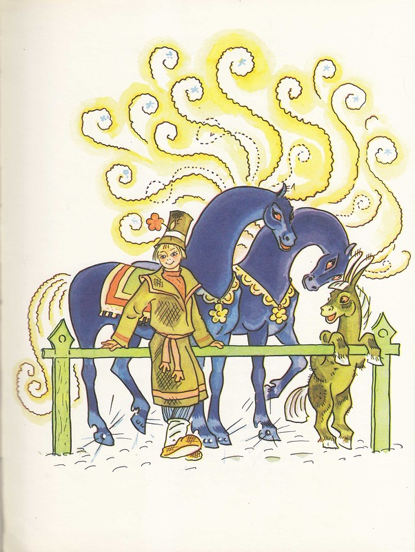 Иллюстрация к сказке "Конек Горбунок". Художник Д. А. Брюханов